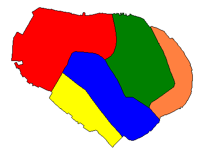 Mappa di Burano divisa per sestieri: in giallo Giudecca, in blu San Martino Sinistra, in verde San Martino Destra, in rosso San Mauro, in arancio Terranova. San Mauro Giudecca San Martino Sinistra San Martino Destra Terranova